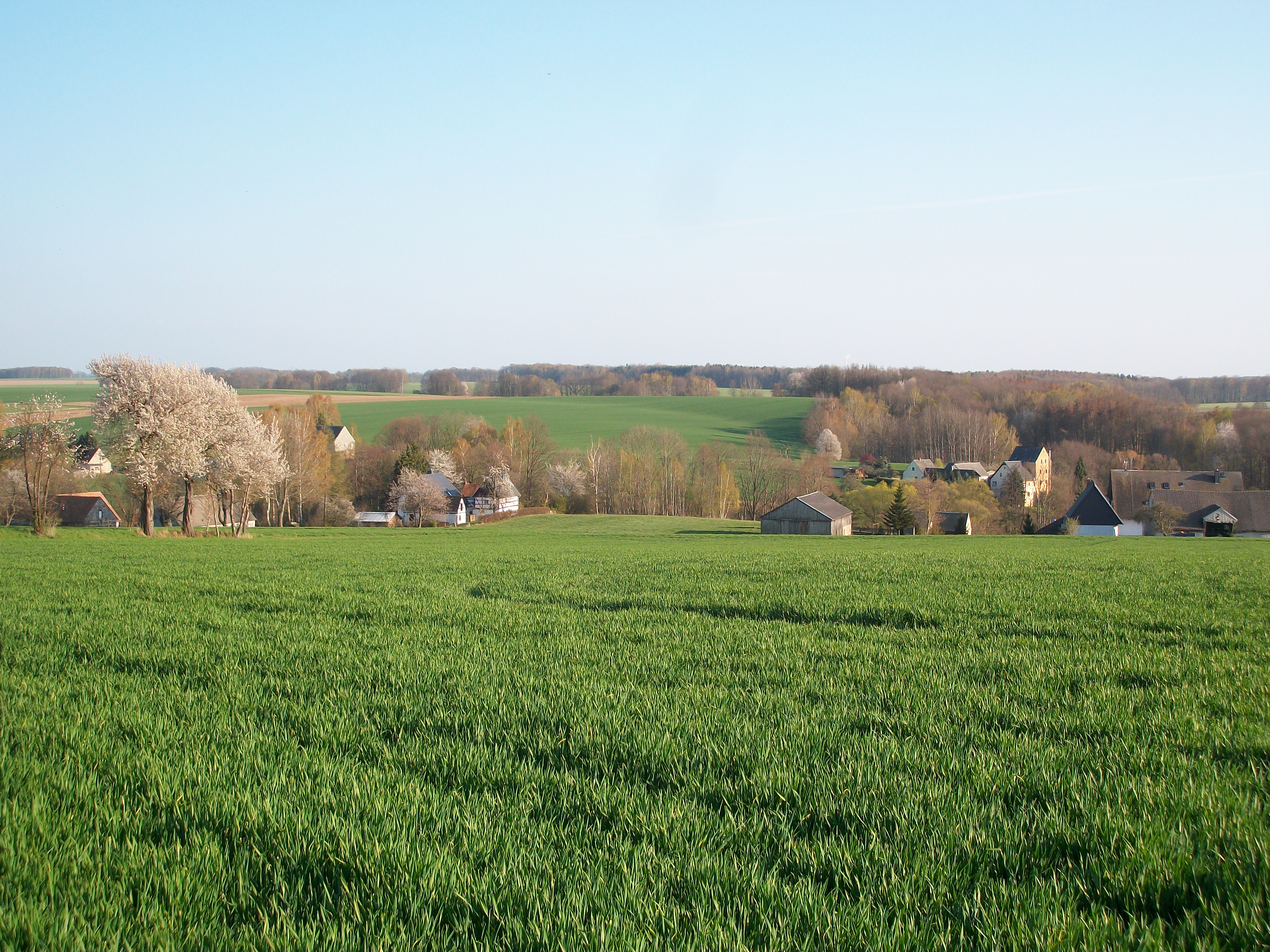 Blick auf Thalheim (Mittweida)